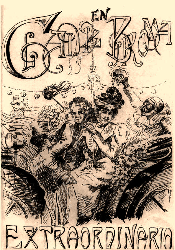 Cartel anunciador del carnaval de 1906